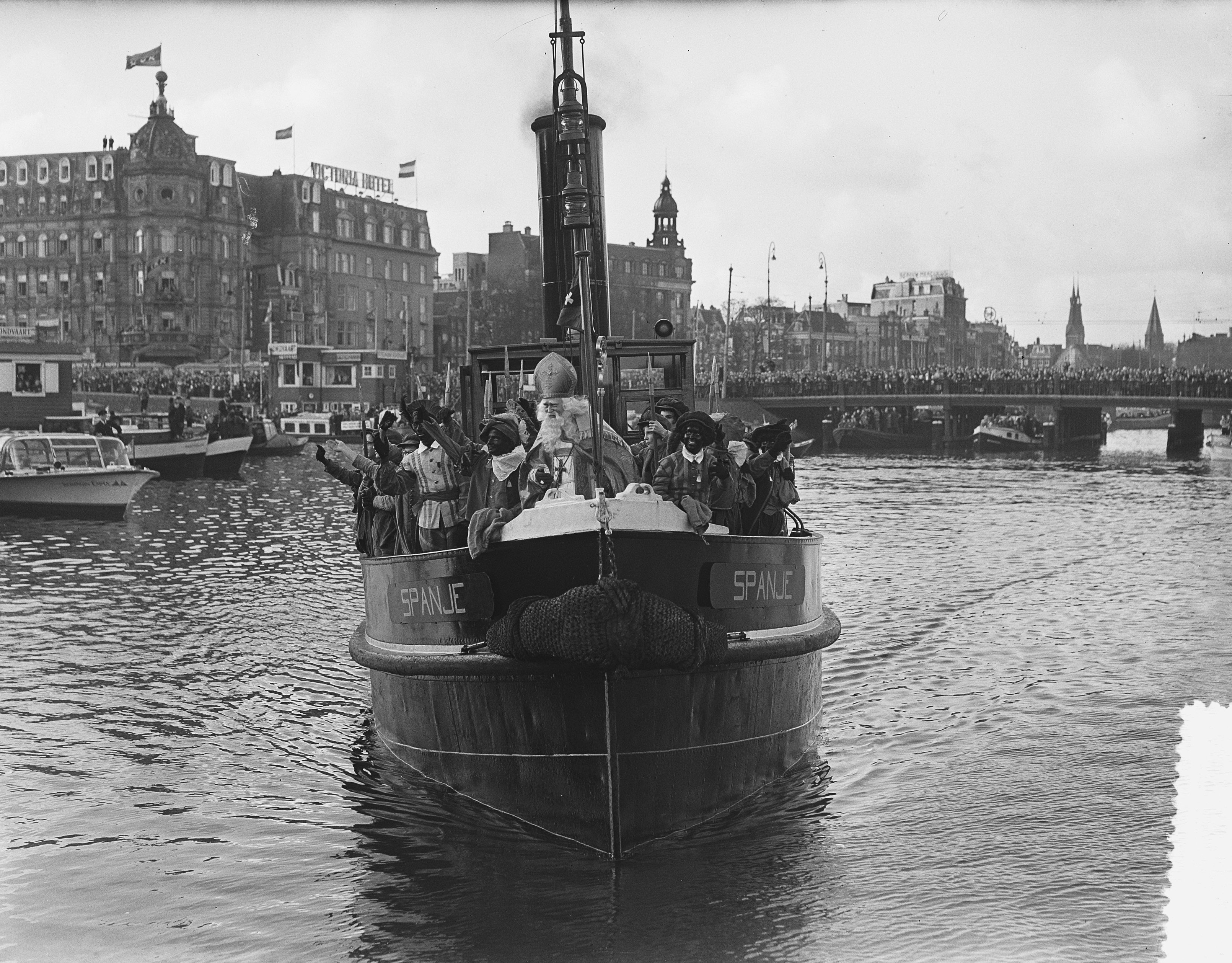 Collectie / Archief : Fotocollectie Anefo Reportage / Serie : [ onbekend ] Beschrijving : Aankomst Sint Nicolaas te Amsterdam Datum : 19 november 1955 Locatie : Amsterdam, Noord-Holland Trefwoorden : AANKOMST Persoonsnaam : Sinterklaas Fotograaf : Bilsen, Joop van / Anefo Auteursrechthebbende : Nationaal Archief Materiaalsoort : Glasnegatief Nummer archiefinventaris : bekijk toegang 2.24.01.09 Bestanddeelnummer : 907-4437